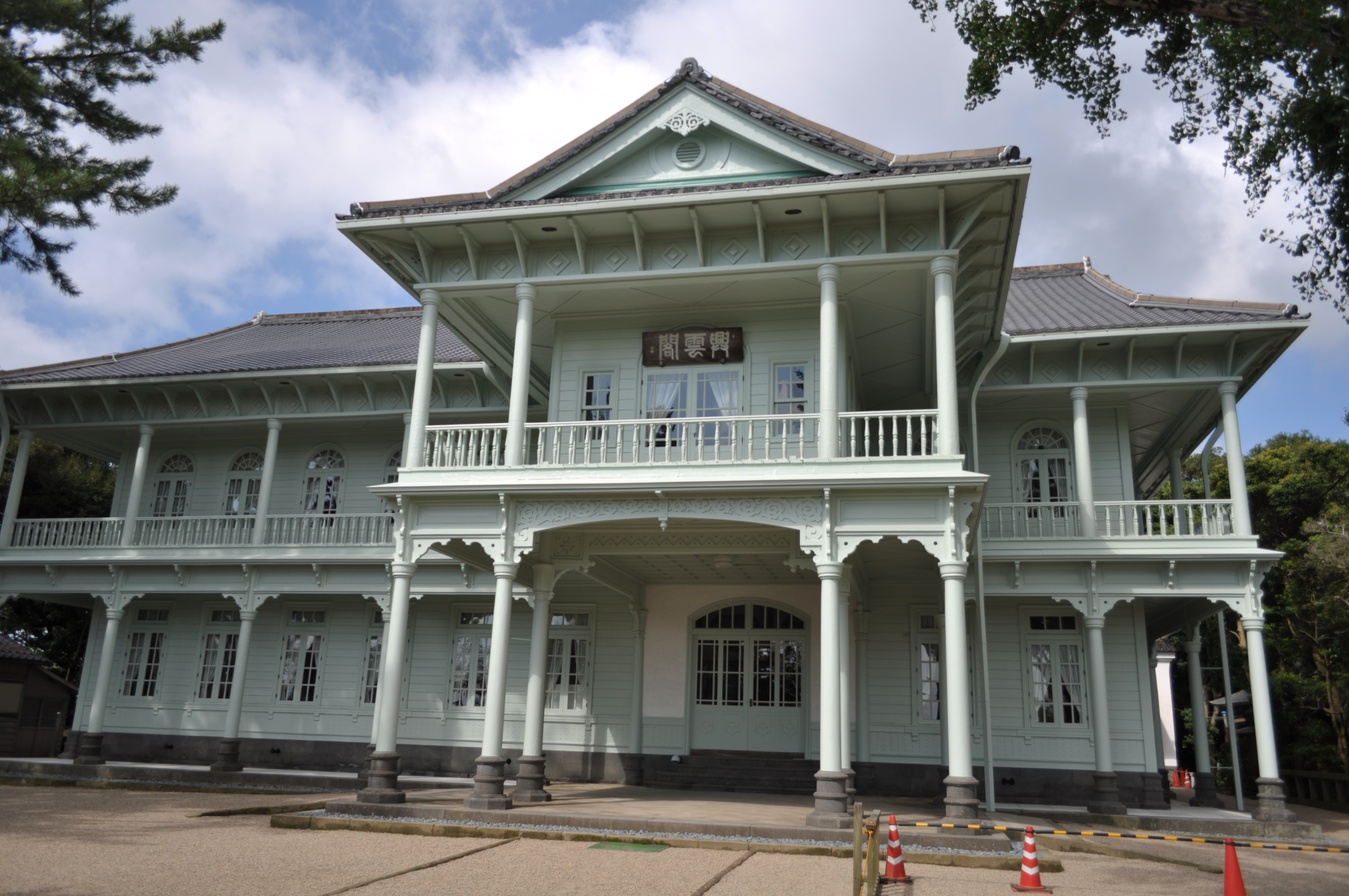 （2015年9月11日撮影）